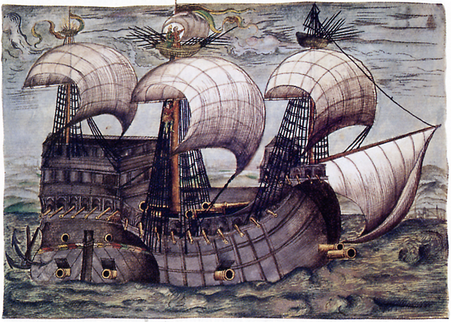 Die Galeone La Santa Trinidad, mit der der deutsche Conquistador Philipp von Hutten 1535 im Auftrag der Welser nach Südamerika reiste.